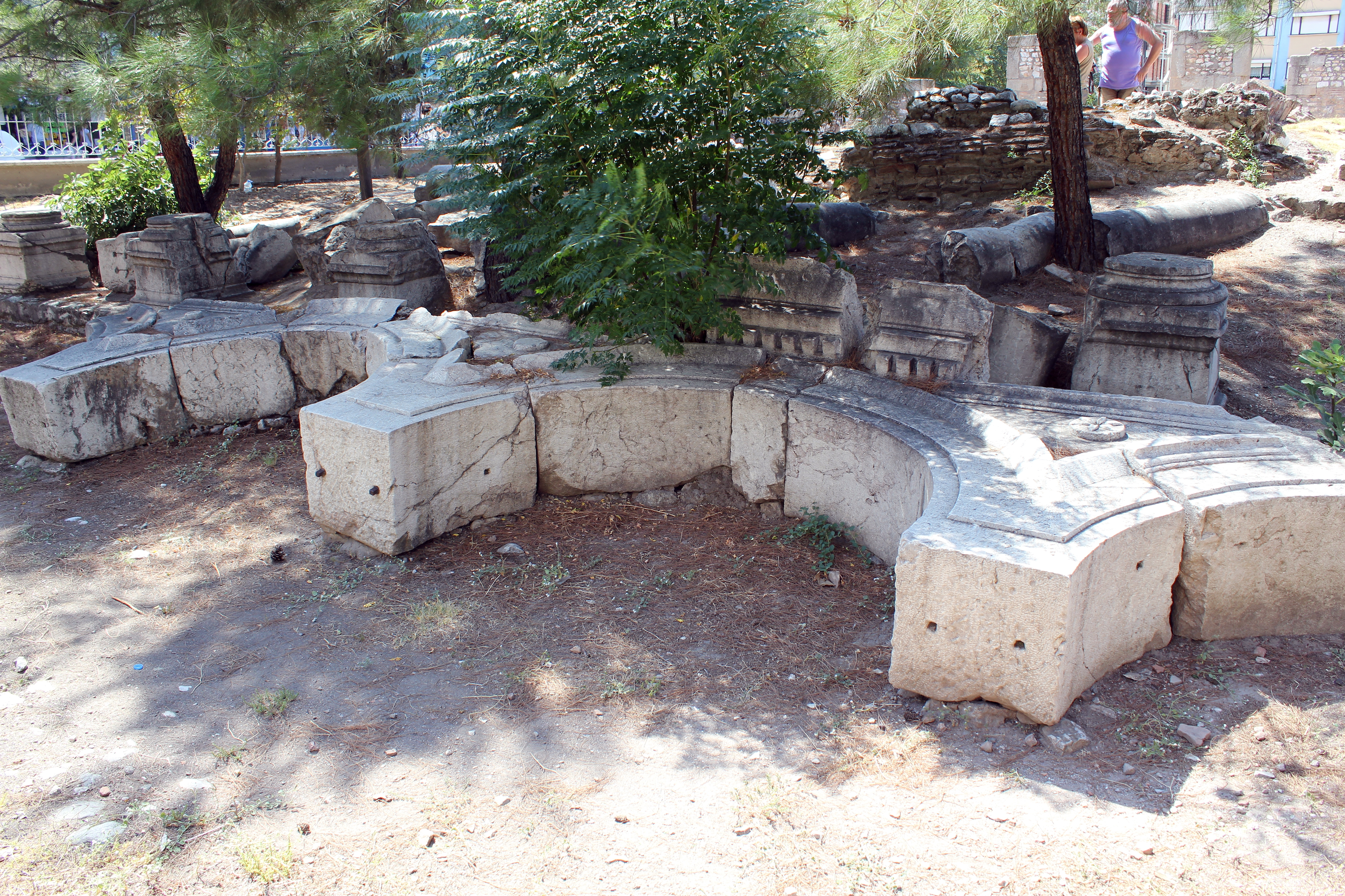 Arkaden in Thyatira, Akhisar, Westtürkei